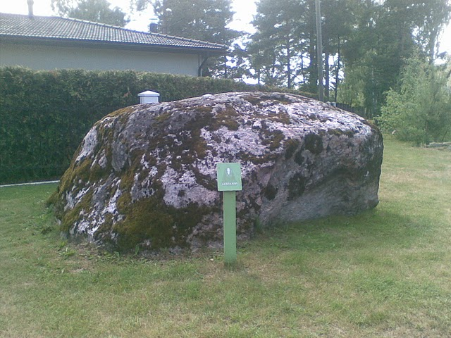 Lesta kivi nimeline rändrahn Vabaõhumuuseumi teel Tallinnas.